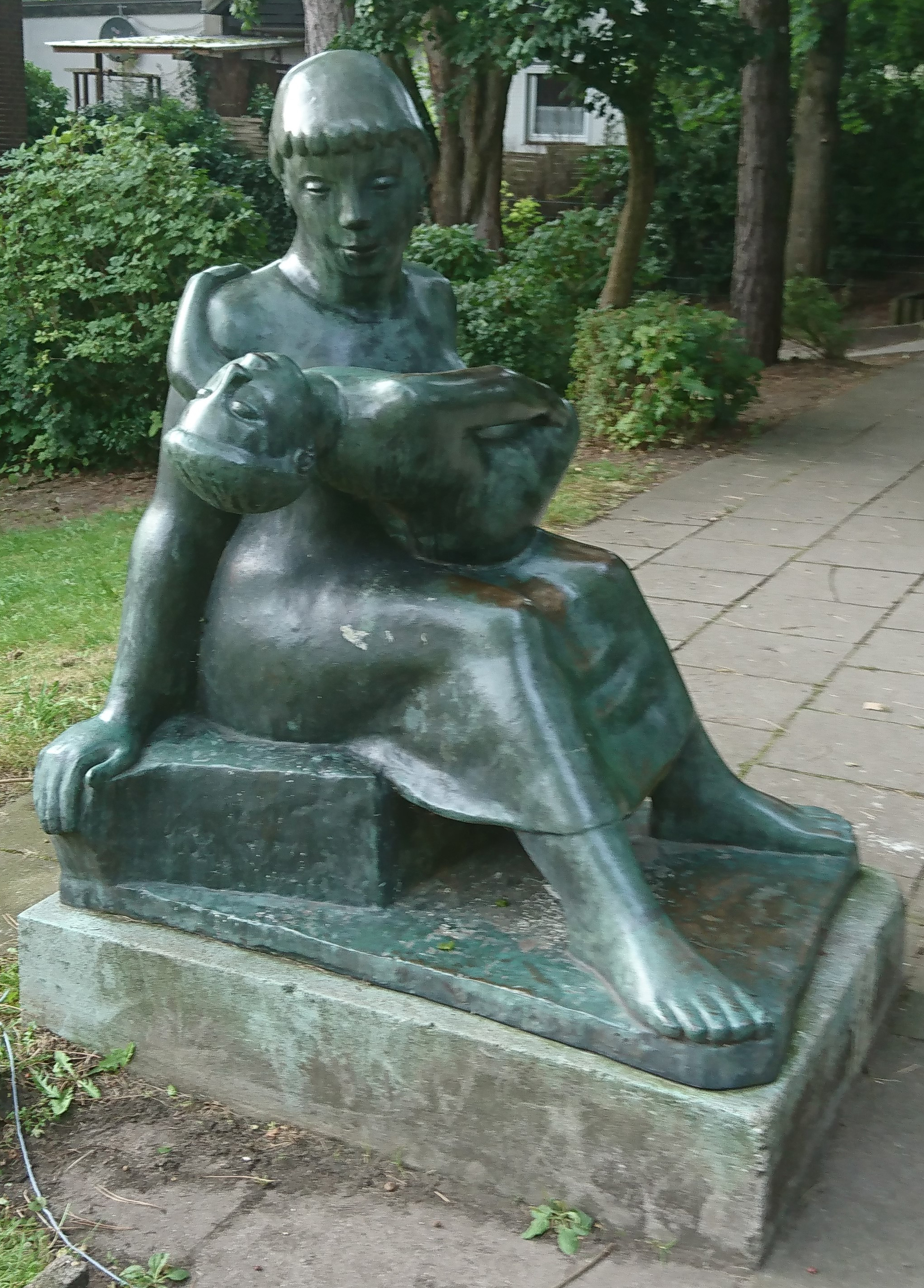 Bronzeskulptur "Mutter und Kind" von Richard Steffen. Aufgestellt 1964. Am Zugang des Kindertagesheim an der Langenhorner Chaussee 321. Höhe: 145 cm. Signatur: "R. Steffen".